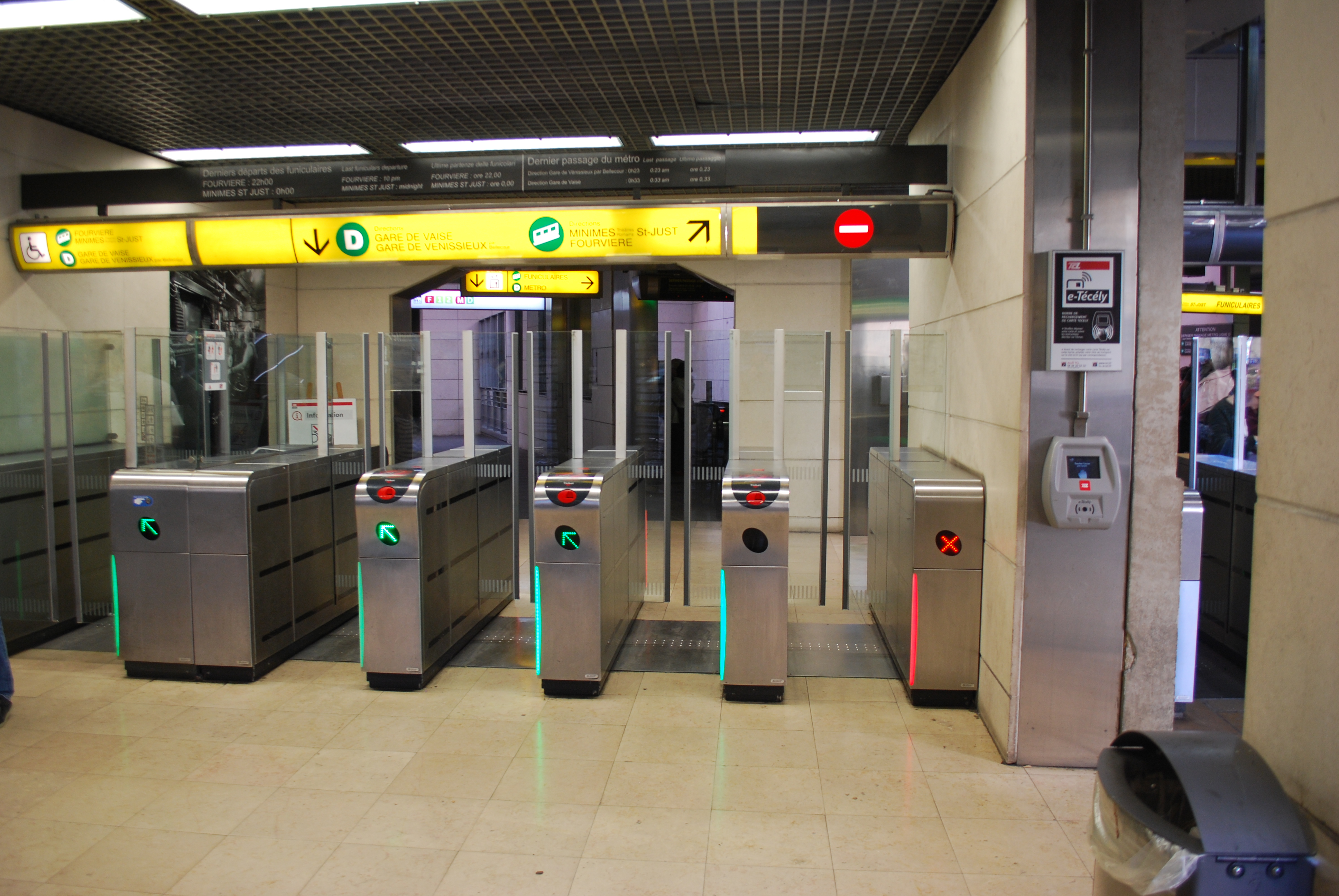 Vue de Lyon.